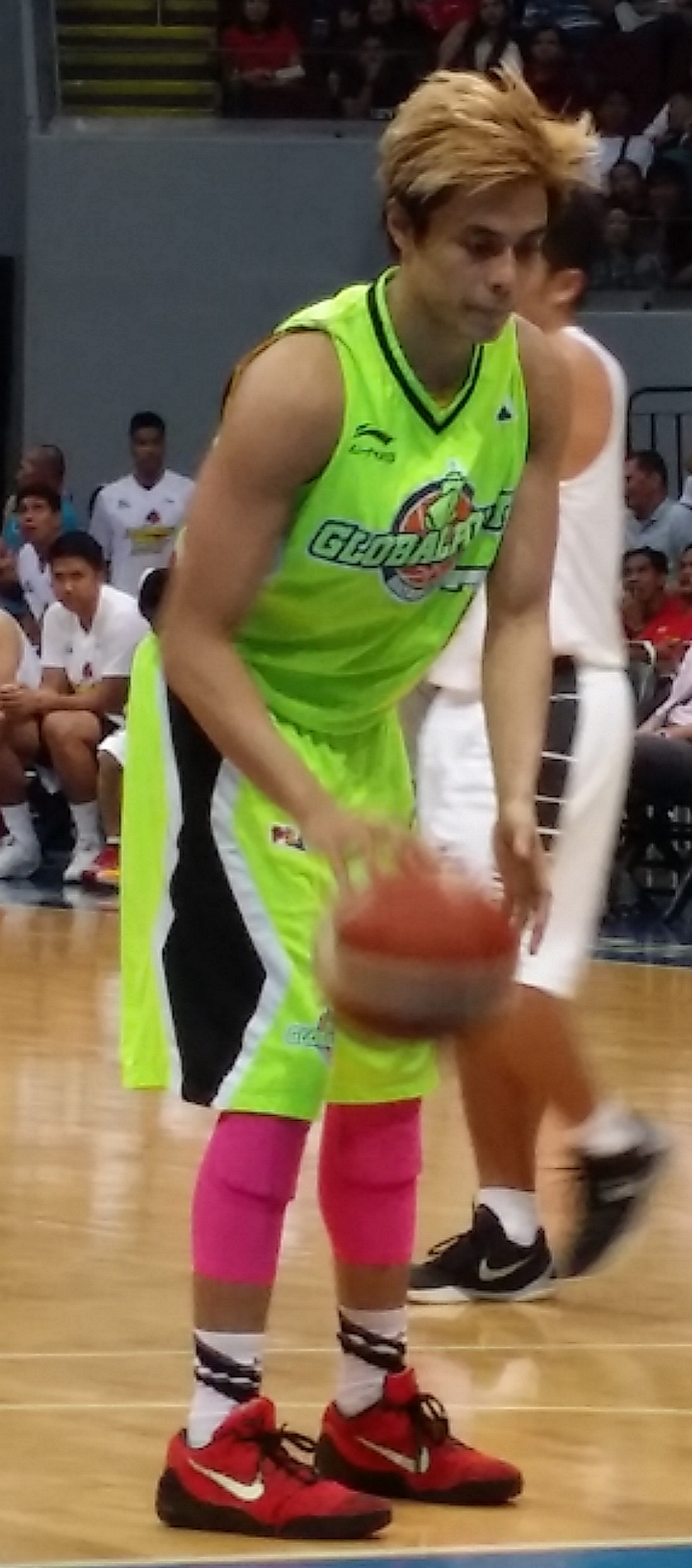 PBA - Globalport vs Barako Bull - Terrence Romeo-GlobalPort - 2015-1225 (23953044826).jpg